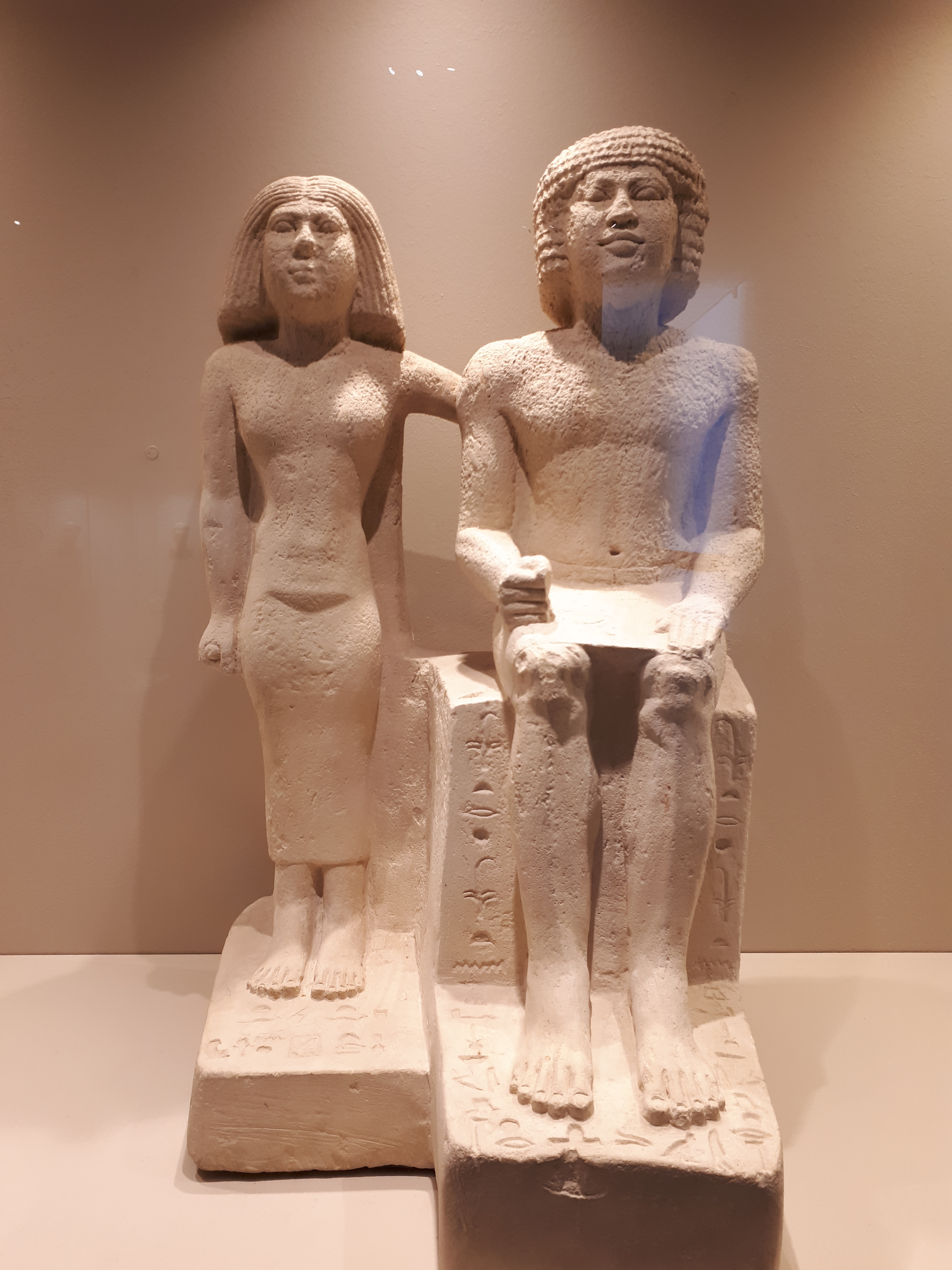 Die Statuengruppe aus Kalkstein stellt den königlichen Gehilfen der Lederarbeiter Imhotep und seine Frau aus dem Alten Reich, späte 5. Dynastie dar. Sie ist im Roemer- und Pelizaeus-Museum Hildesheim ausgestellt.